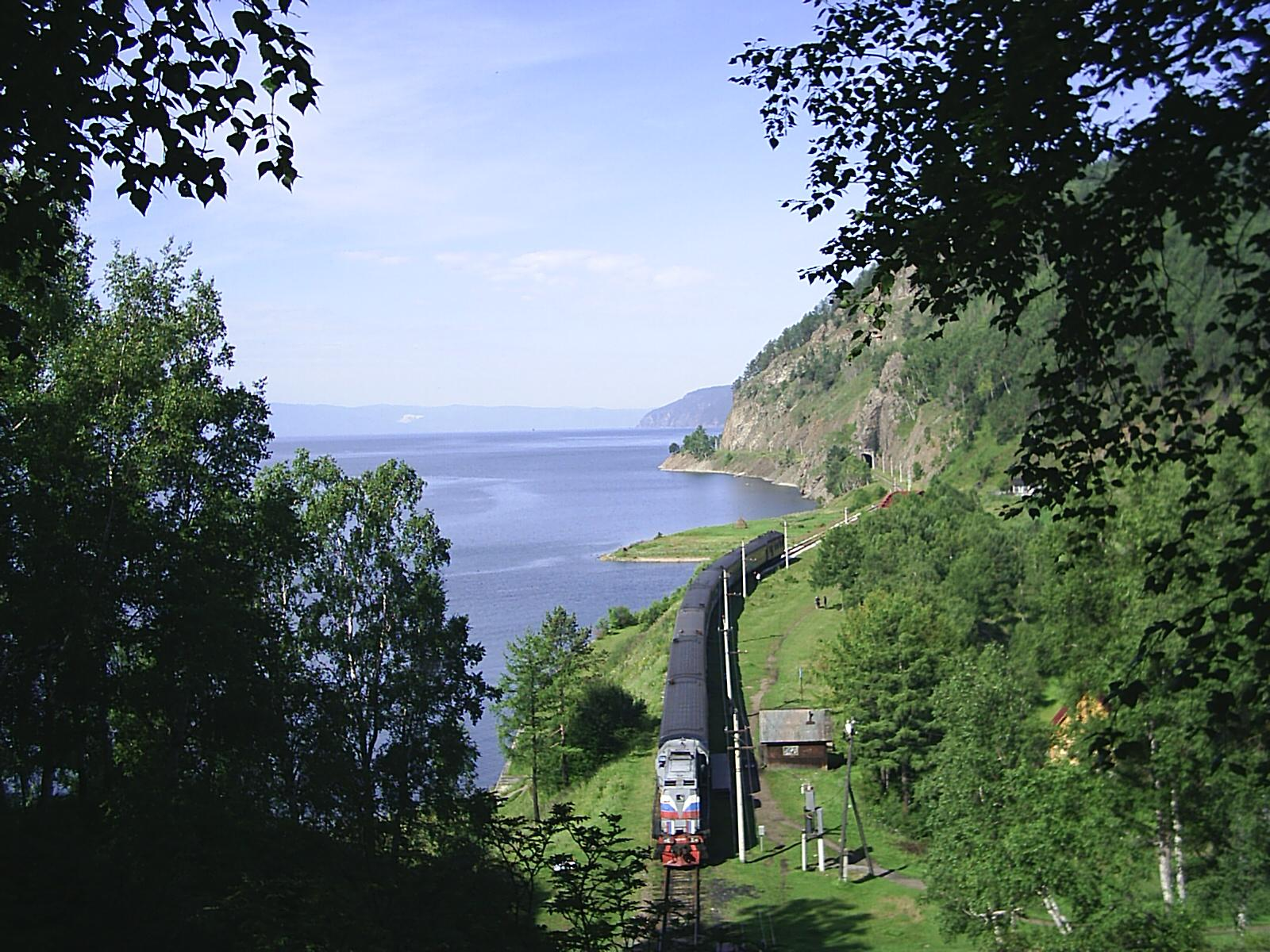 КБЖД. Туристический поезд на станции Половинный. Снимок августа 2006 г.